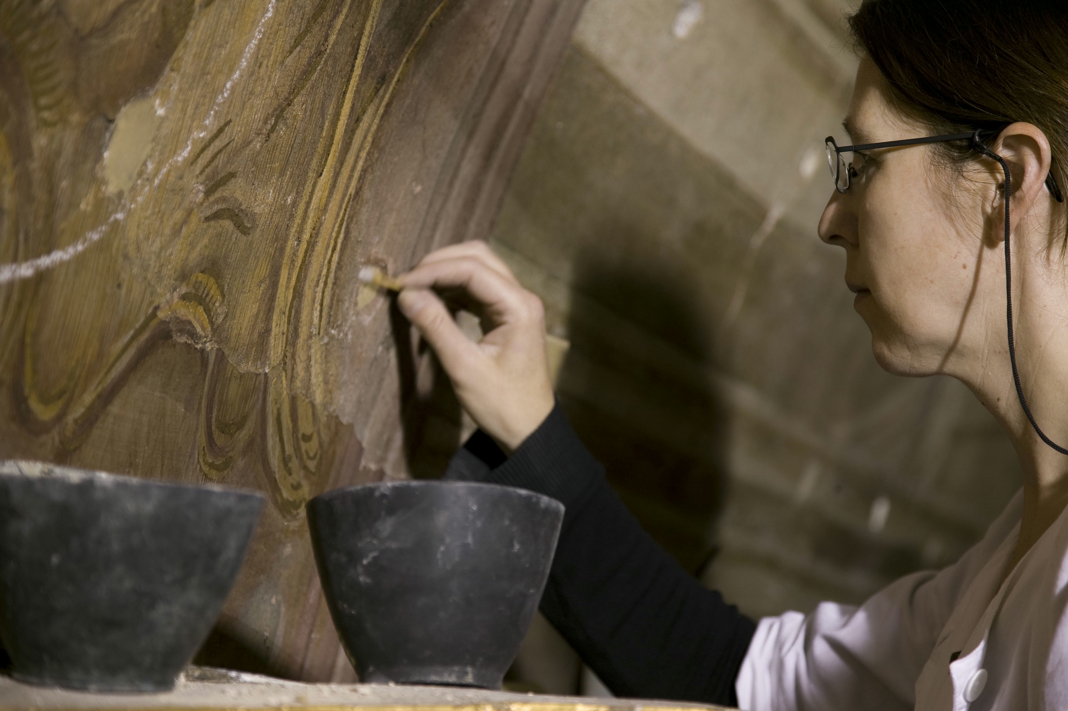 Sint Gerlachuskerk: Interieur, een restaurateur bezig met restauratie van een schildering.